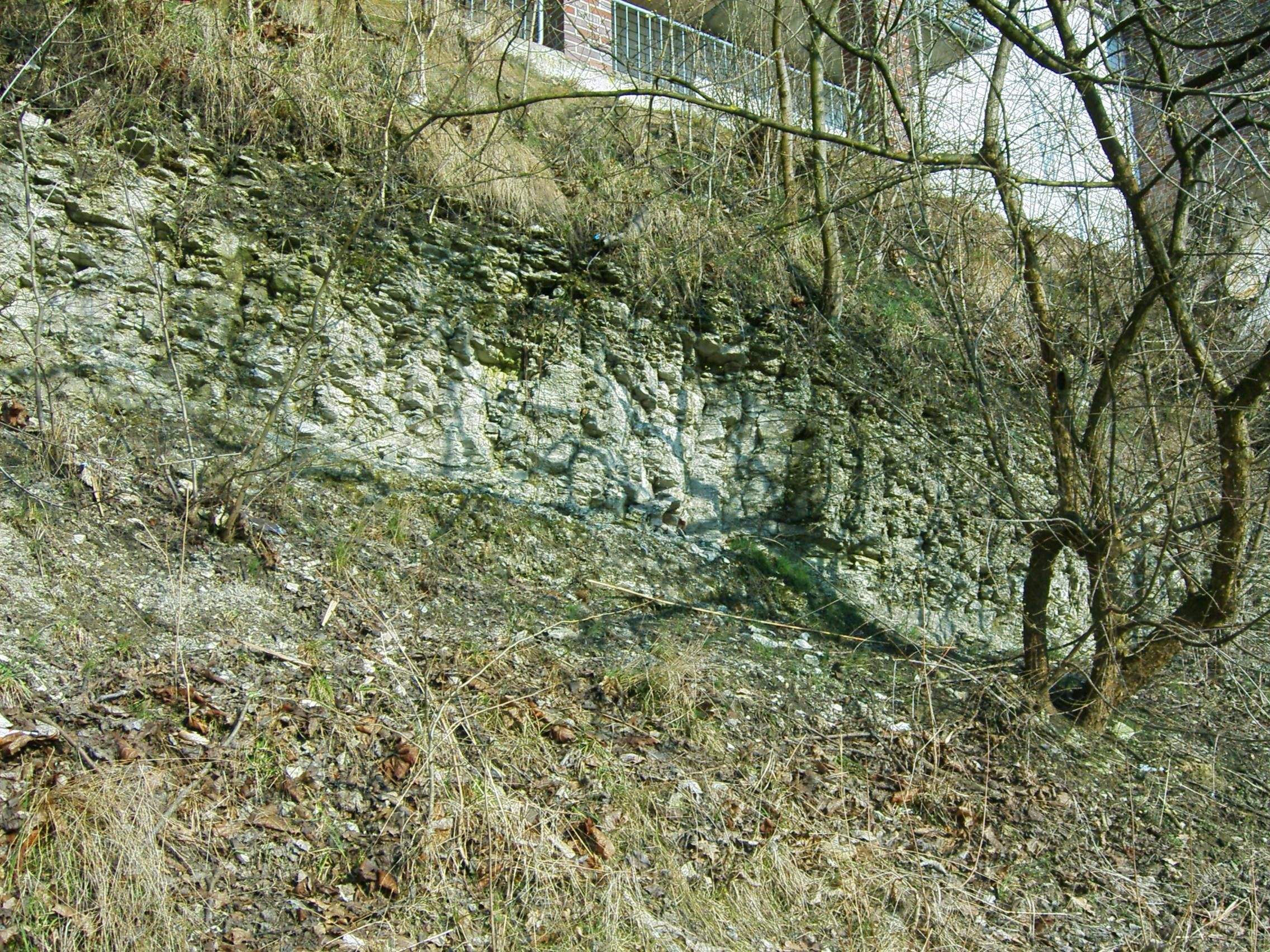 Rheine, Steilufer der Ems auf der rechten Emsseite in Höhe des Emswehr